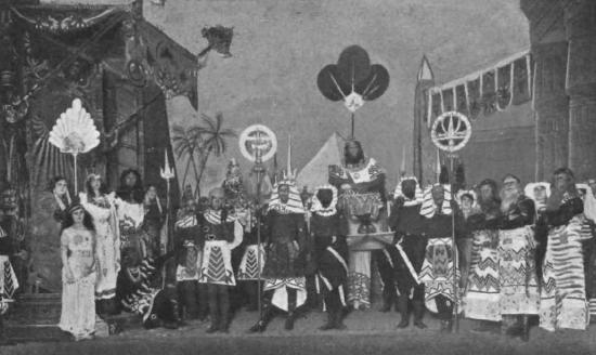 Escena del cuadro primero en el estreno de la Zarzuela La Corte del Faraón